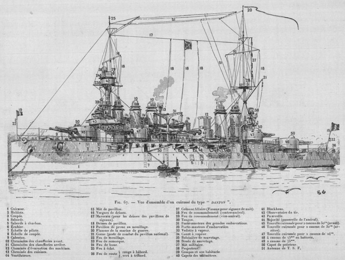 Vue détaillée d'un cuirassé français type Danton en 1910.